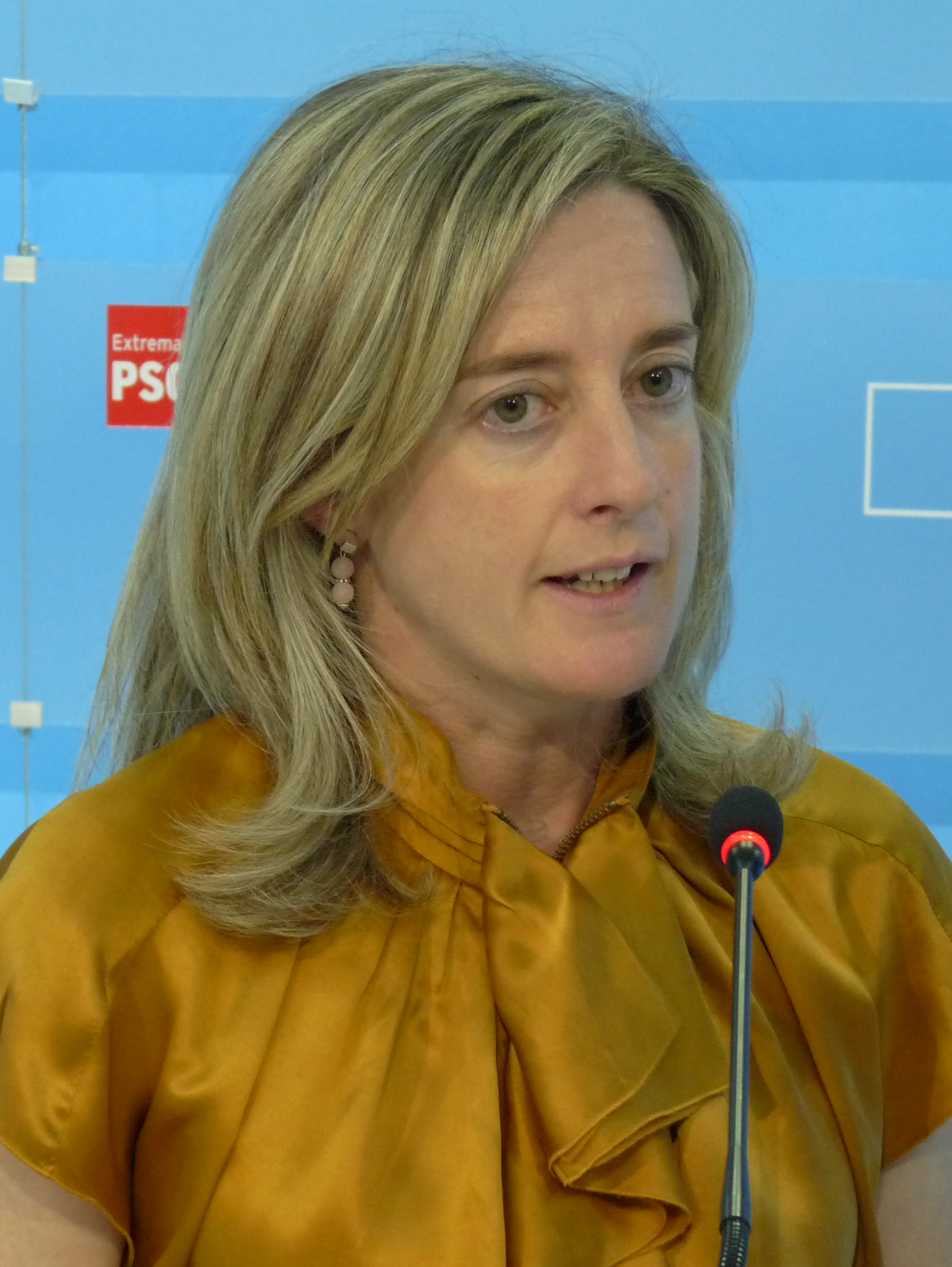 Soledad Cabezón, Secretaria de Igualdad Federal, atiende a los medios de comunicación a su llegada a Mérida